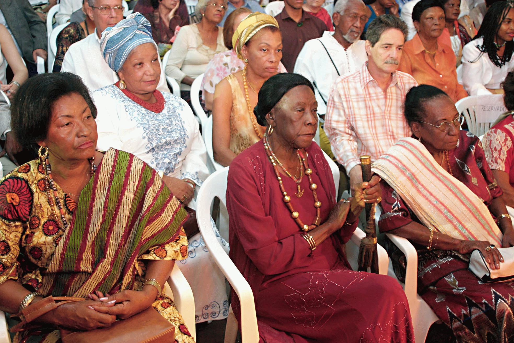 Iyalorixás do Candomblé, mãe Olga do Alaketu ao centro, Salvador, Bahia